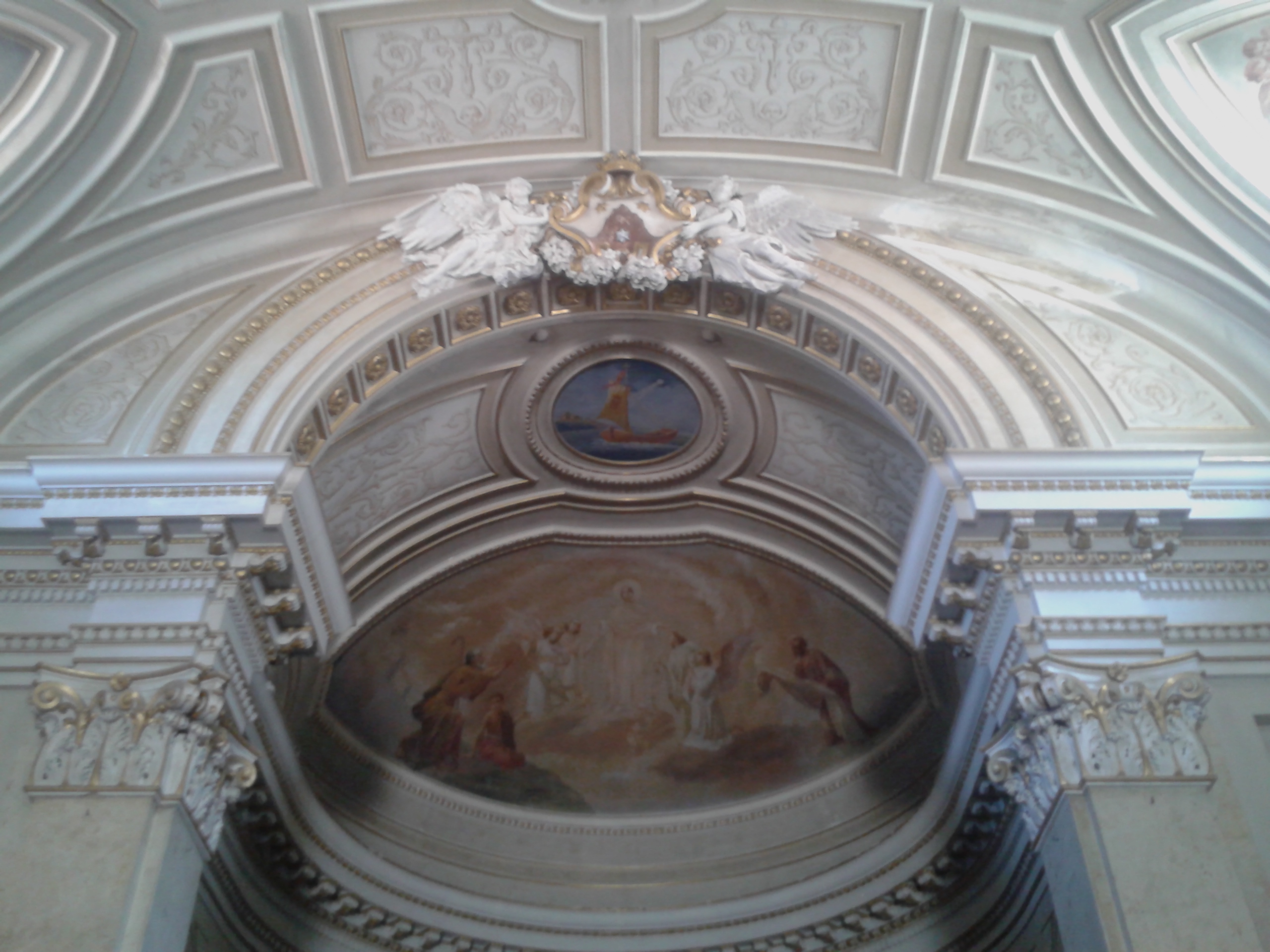 Soffitto abside chiesa del Carmine di Palmi